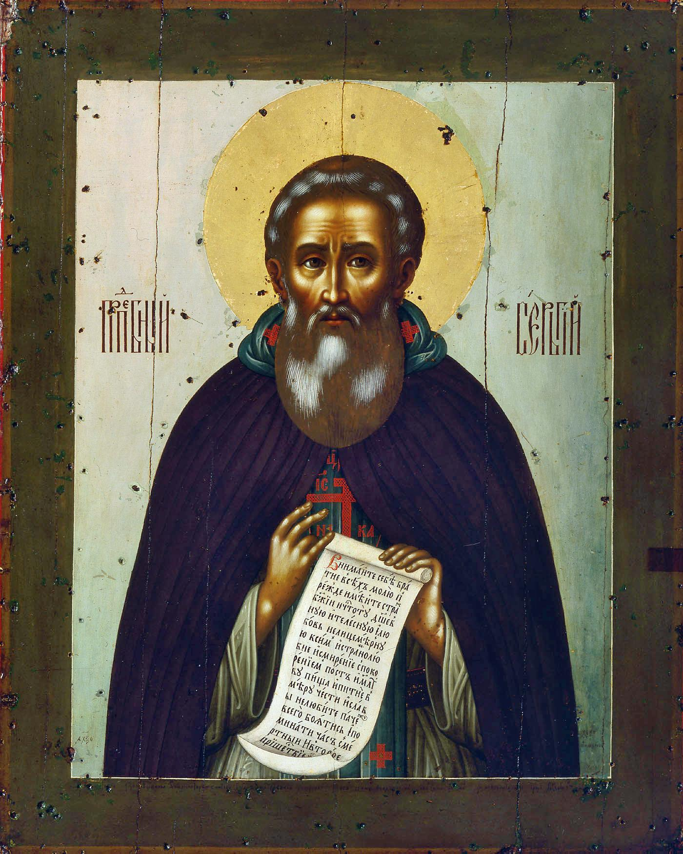 Икона Симона Ушакова - Сергий Радонежский, 1669 год